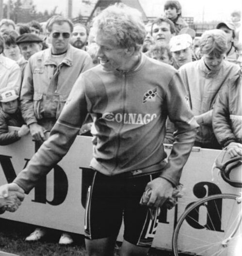 Factual corrections and alternative descriptions are encouraged separately from the original description. Additionally errors can be reported at this page to inform the Bundesarchiv. Original historic description: Zenon Jaskula ADN-ZB CTK-Tele-17-5-87 CSSR: 40 Internationale Friedensfahrt - 9. Etappe - Einzel-Bergzeitfahren-Herzlich gratuliert der polnische Fahrer Zenon Jaskula dem Etappensieger des Einzel-Bergzeitfahrens über 22 km in Harrachov, Uwe Ampler. Zenon Jaskula errang mit 33:27,7 den zweiten Platz.